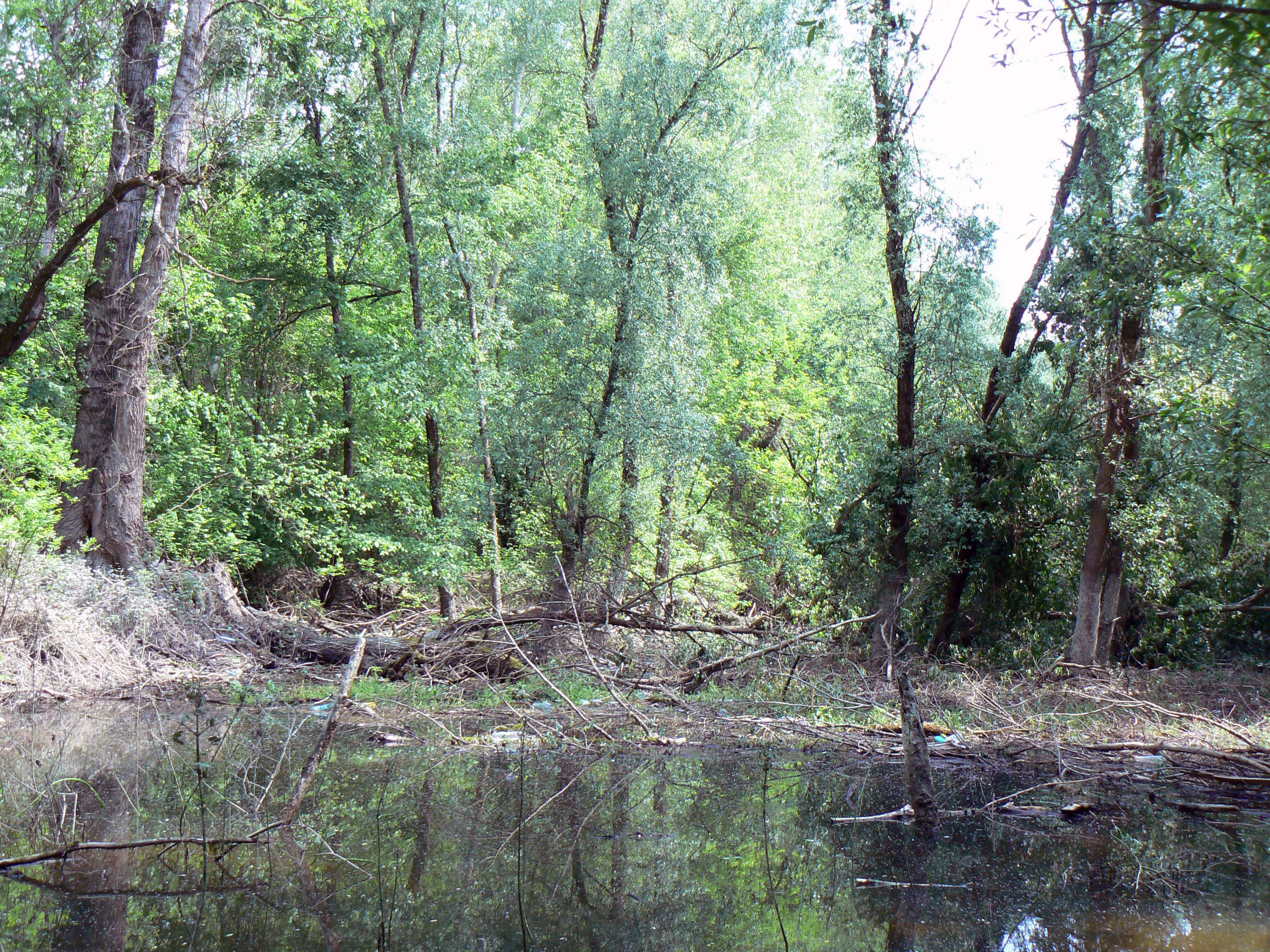 Ковиљско-петроварадински рит Licensing